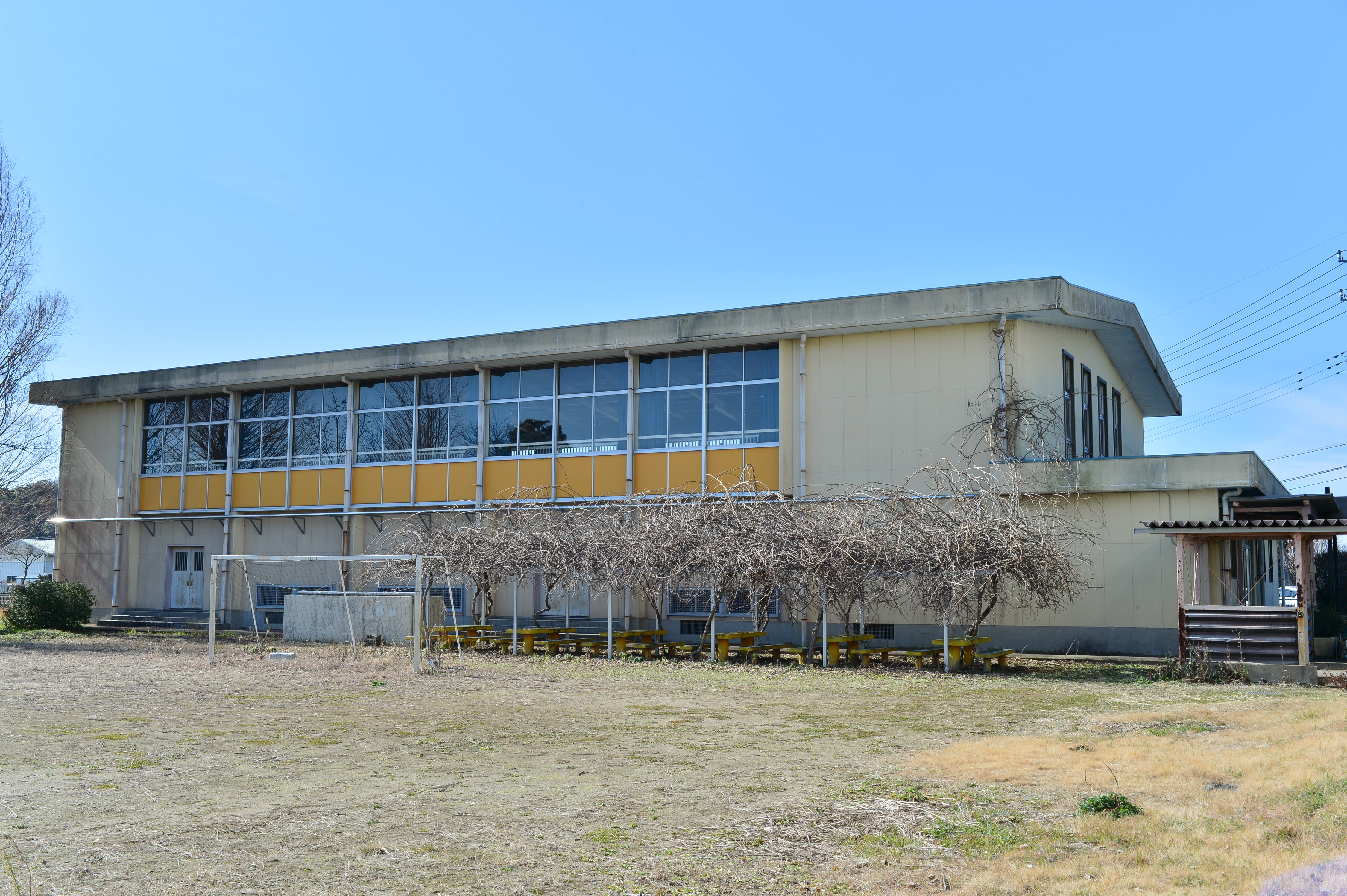 つくば市立菅間小学校の体育館